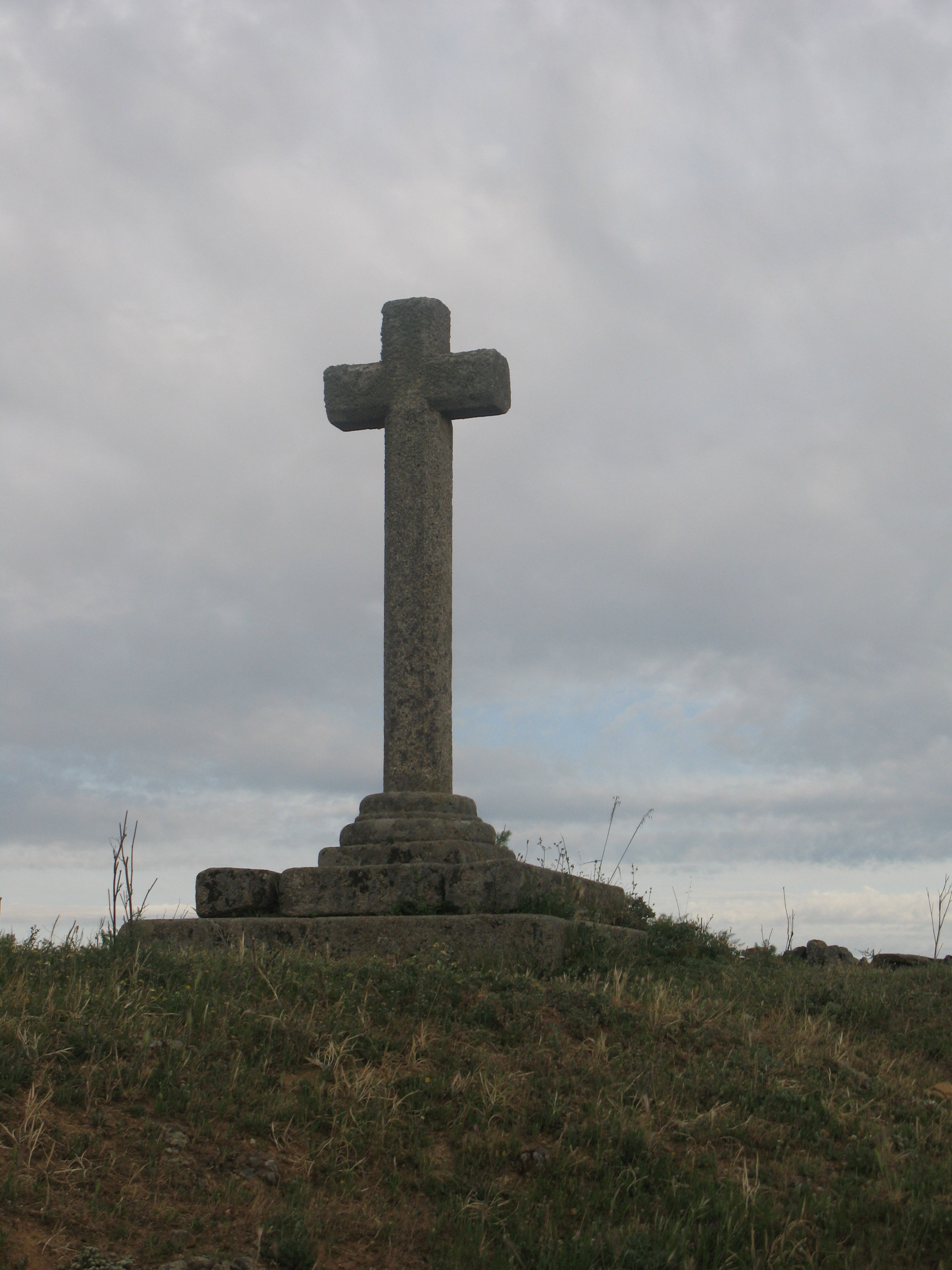 Cruz